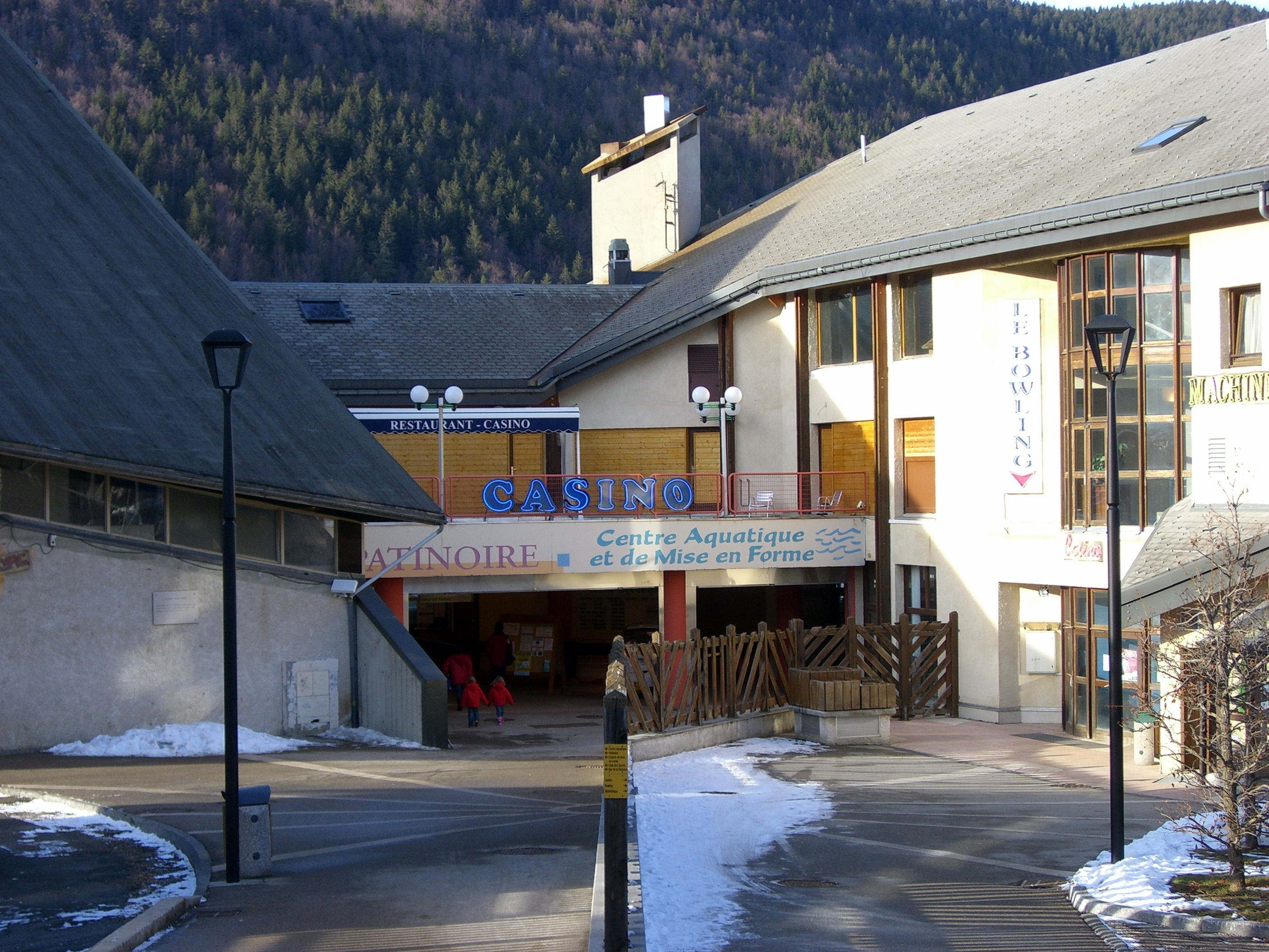 Le Casino de Villard-de-Lans.